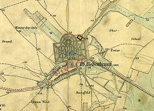 historische Landkarte: Gradkartenblatt Zone 12 Colonne XV Section d (später 4657/4). Marchfeld: Gänserndorf, Leopoldsdorf, Weikersdorf. Franzisco-josephinische (3.) Landesaufnahme der österreichisch-ungarischen Monarchie. Aufnahmeblatt 1:12.500. Aufgenommen 1873.